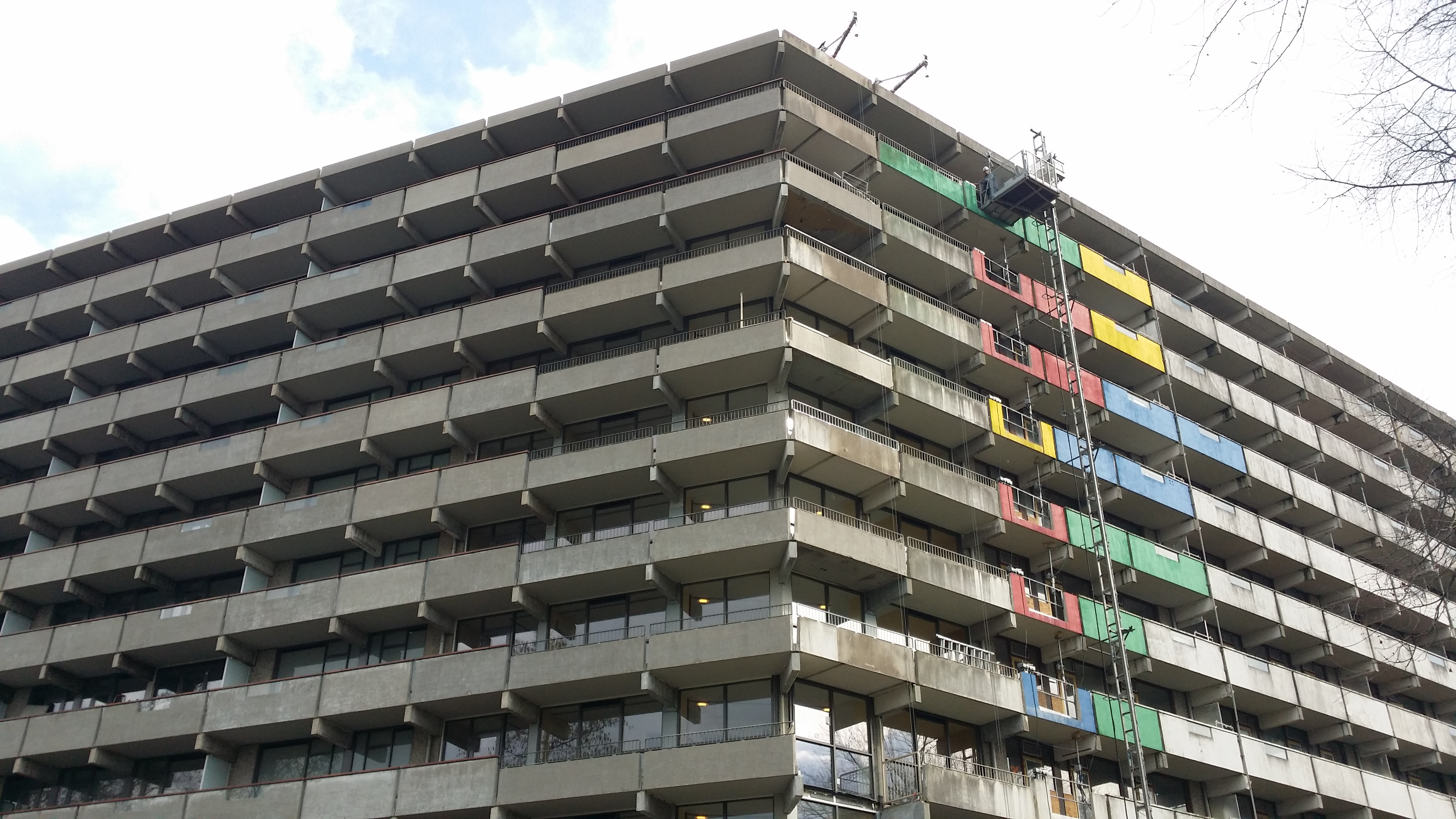 De flat Kleiburg in Amsterdam Zuidoost, afgebeeld woonsegment fase 1 en rechts 2.